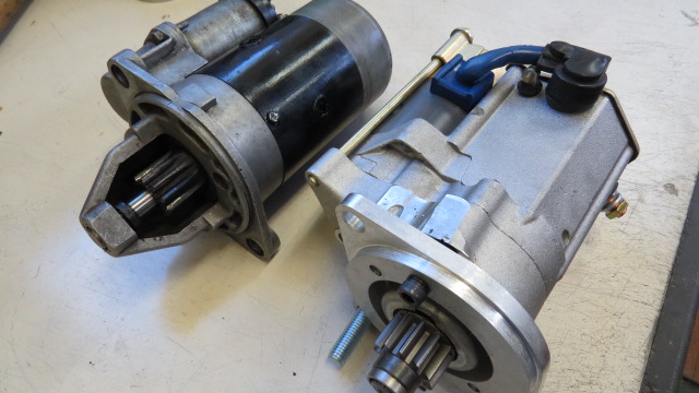 リダクションタイプとの比較